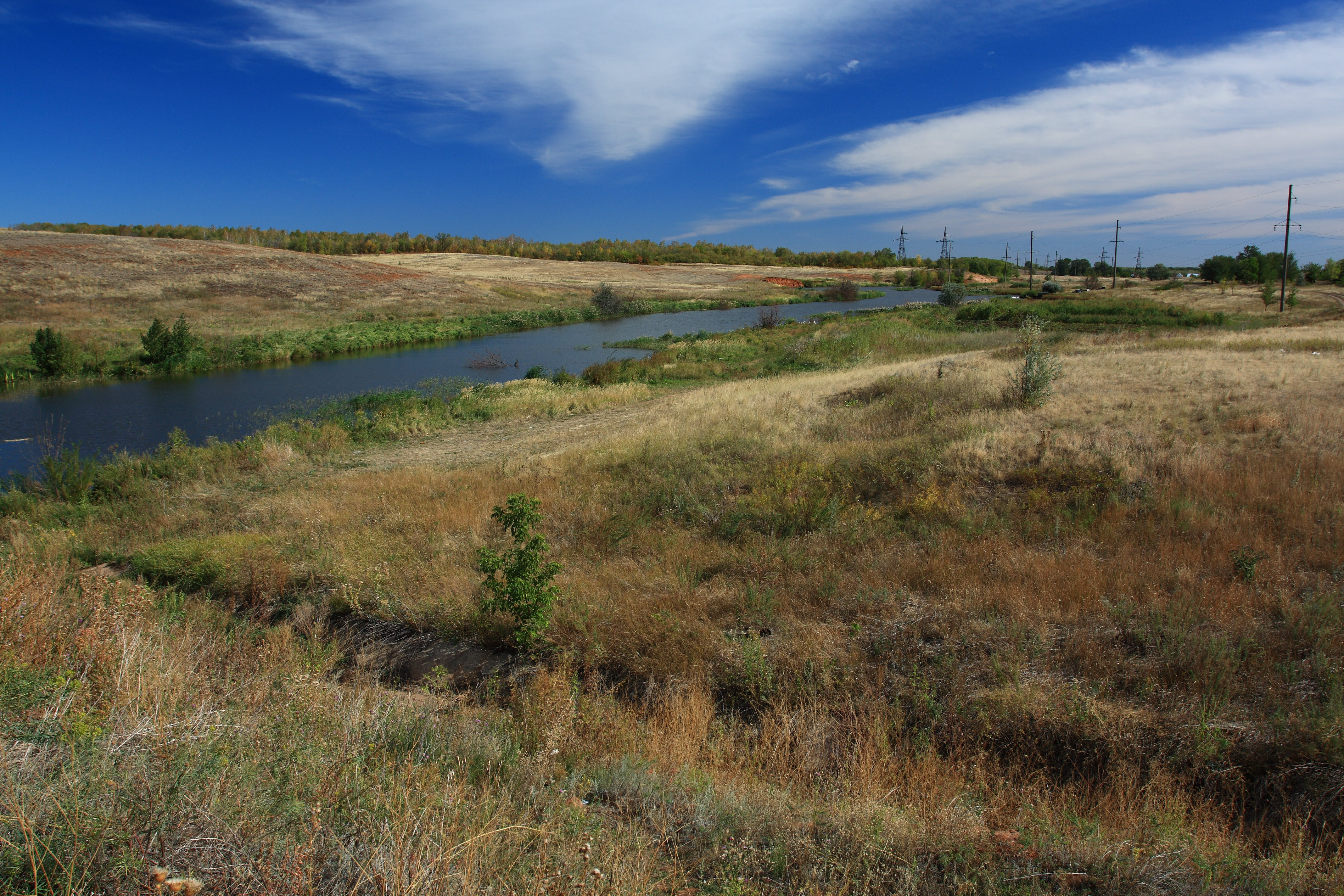 Речка Чёрная